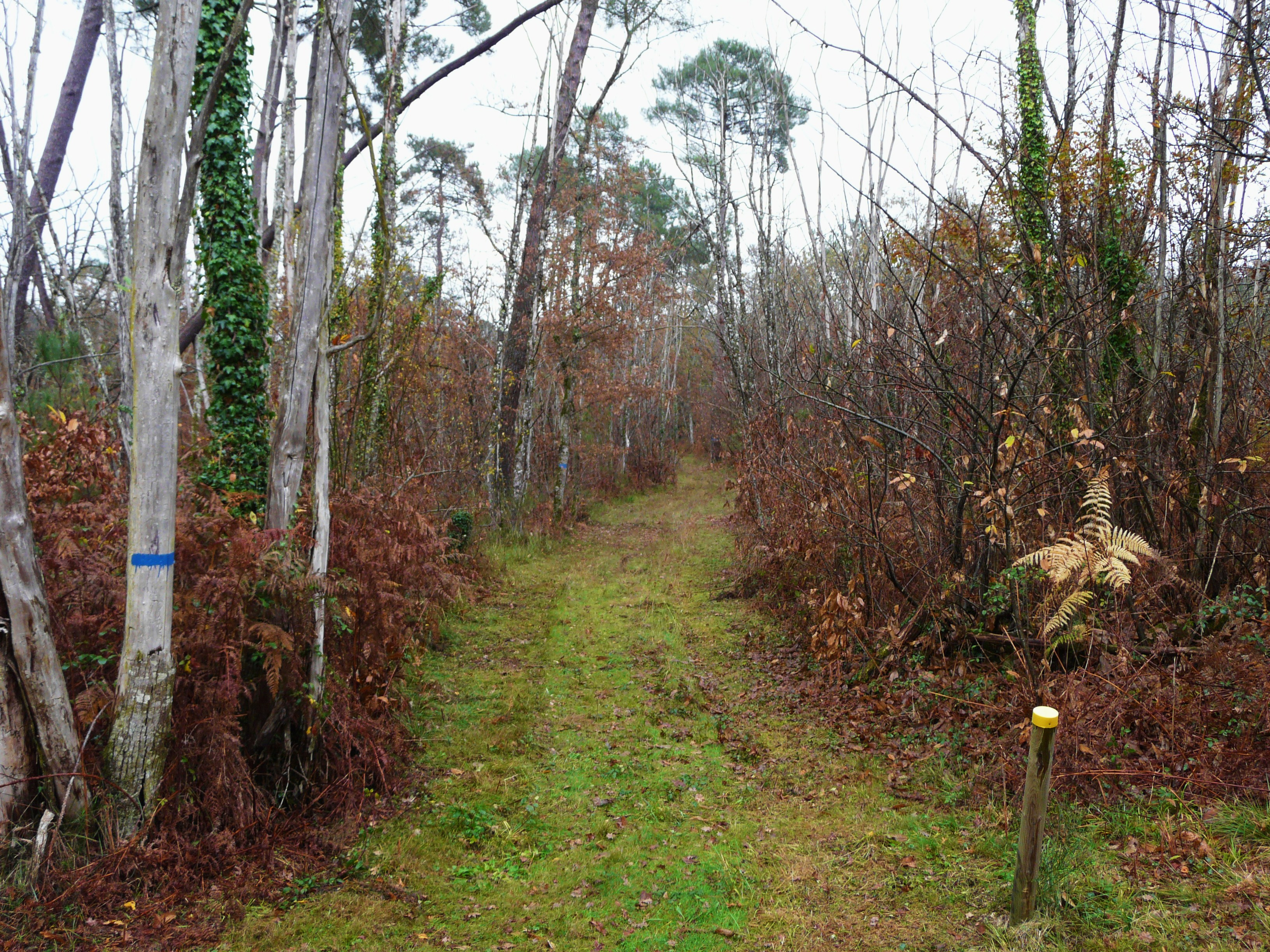 La forêt de la Double entre le Moulin de Beauronne et le bourg de Douzillac, Dordogne, France